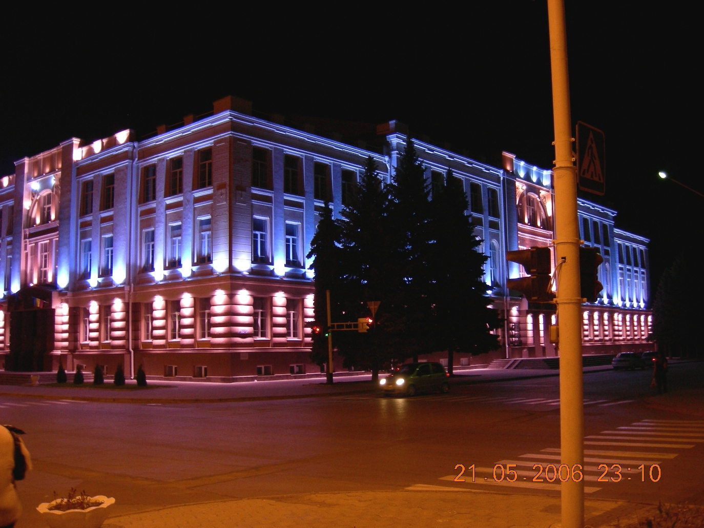 Казачий Драматичекий театр им.Комиссаржевской